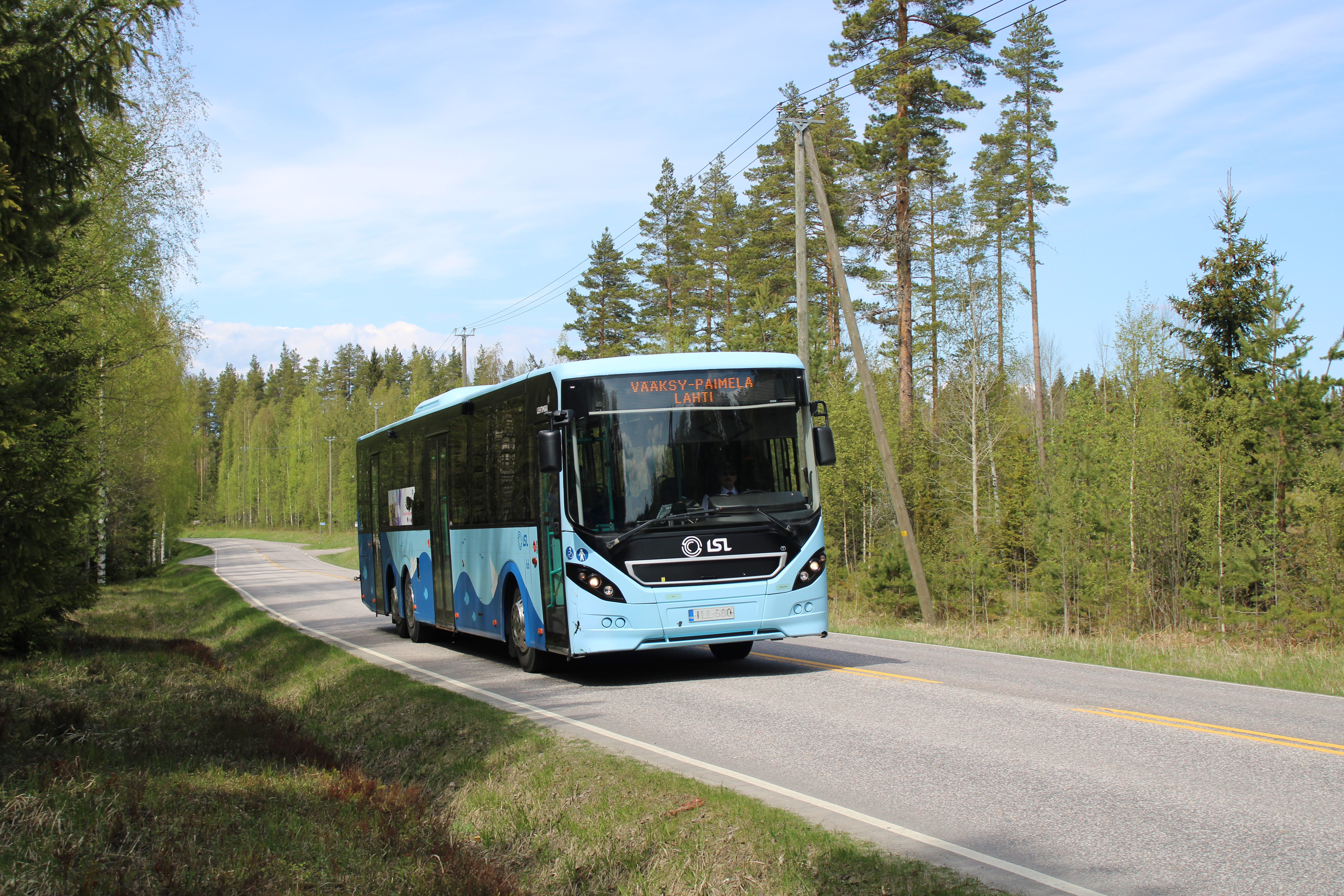 Lehtimäen Liikenteen #66 Volvo 8900LE, lsl tilaajaväreissä, Asikkalassa Vääksy-Lahti linjalla.